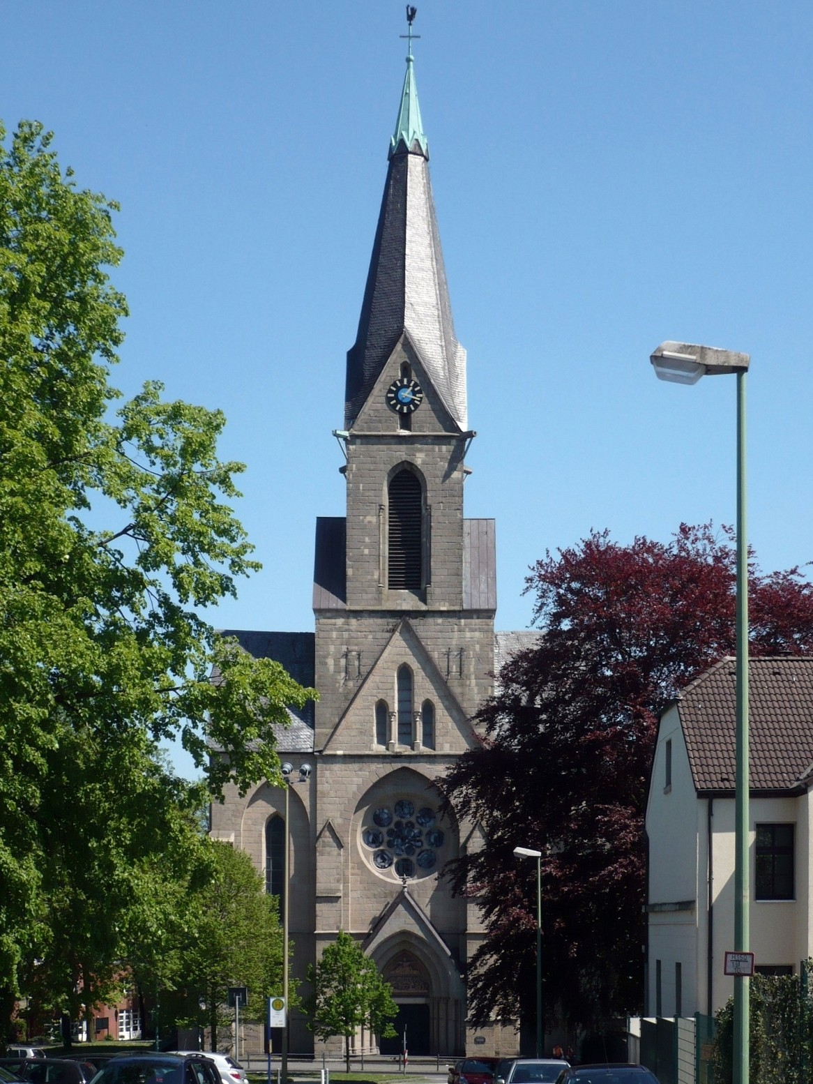 St. Laurentiuskirche in Essen-Steele